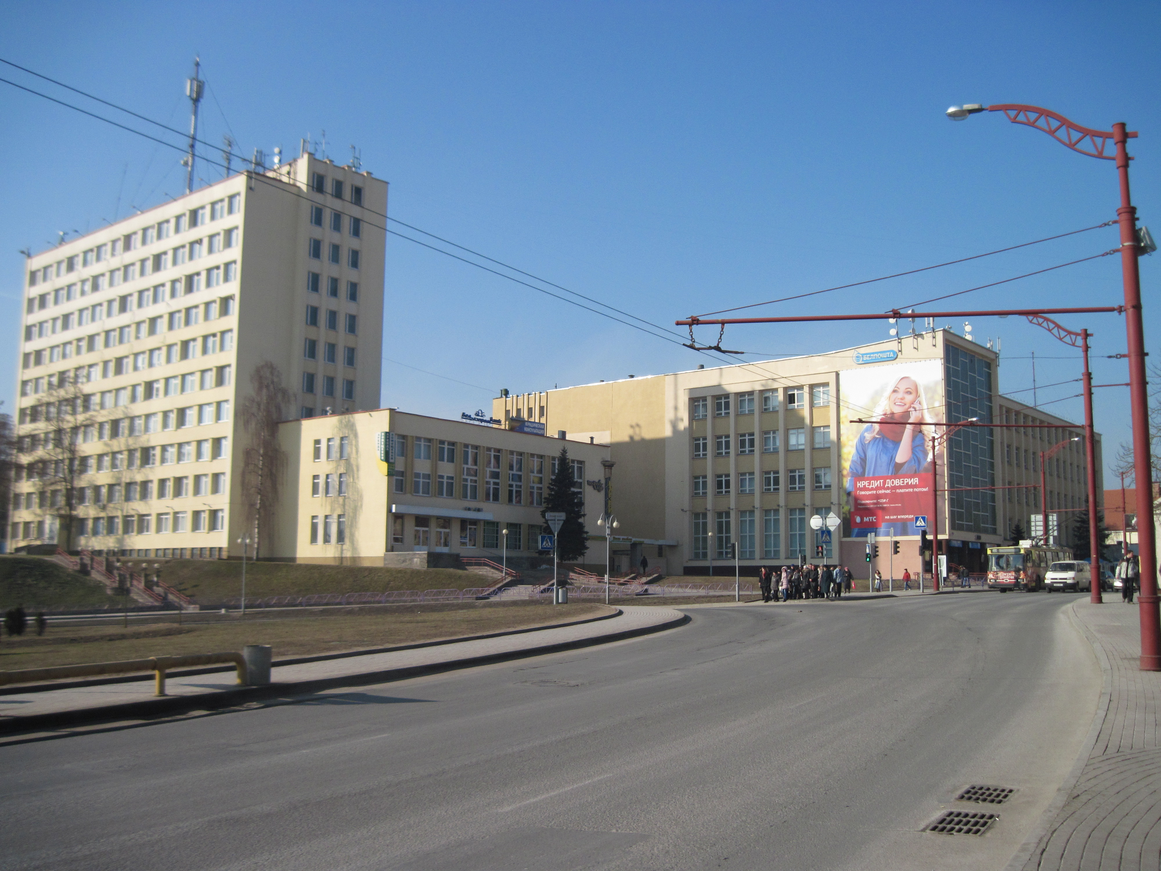 Дом сувязі. Гродна. Вуліца К. Маркса, 29